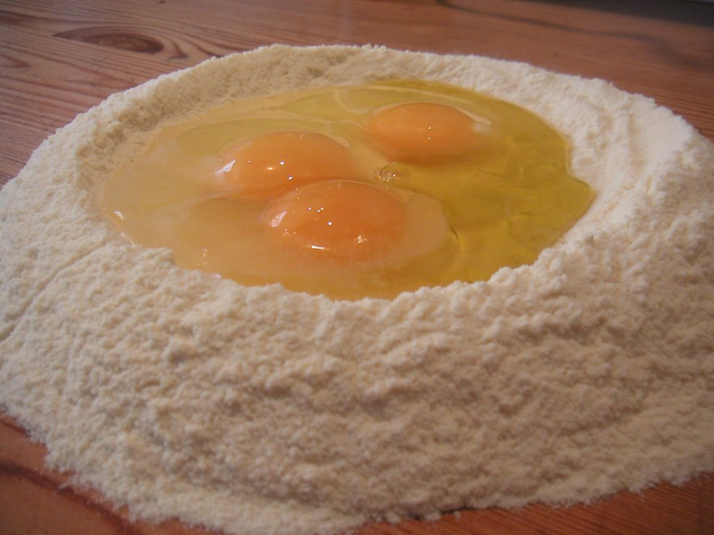 Pastadej